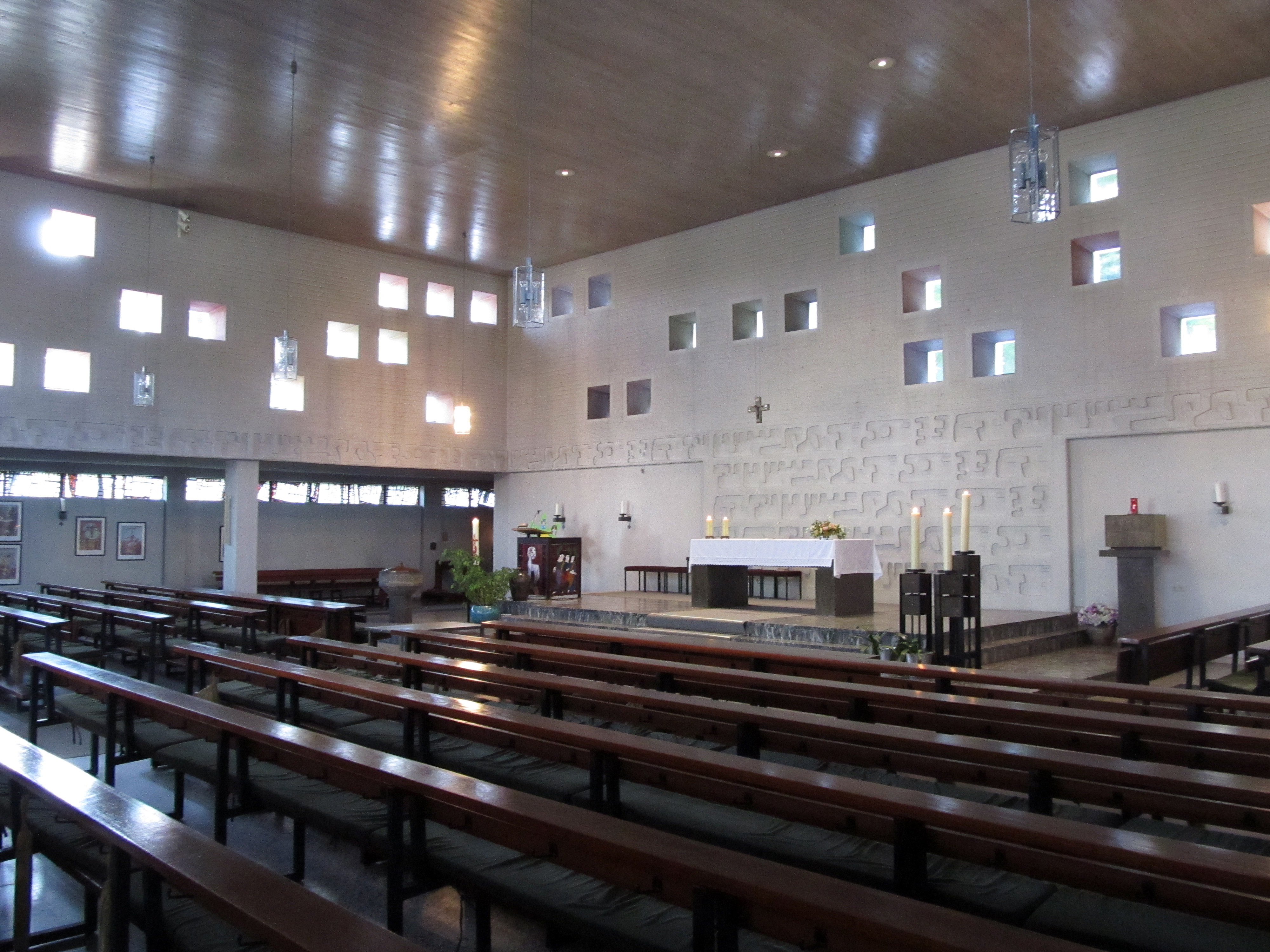 Blick ins Innere der katholischen Kirche Mariä Geburt in Schwarzenacker, einem Stadtteil von Homburg, Saarland